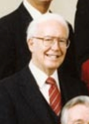 Terrel Bell